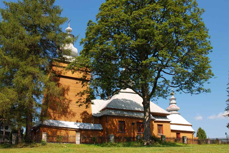 Lemko Greek Catholic church in Mochnaczka Niżna (Poland).